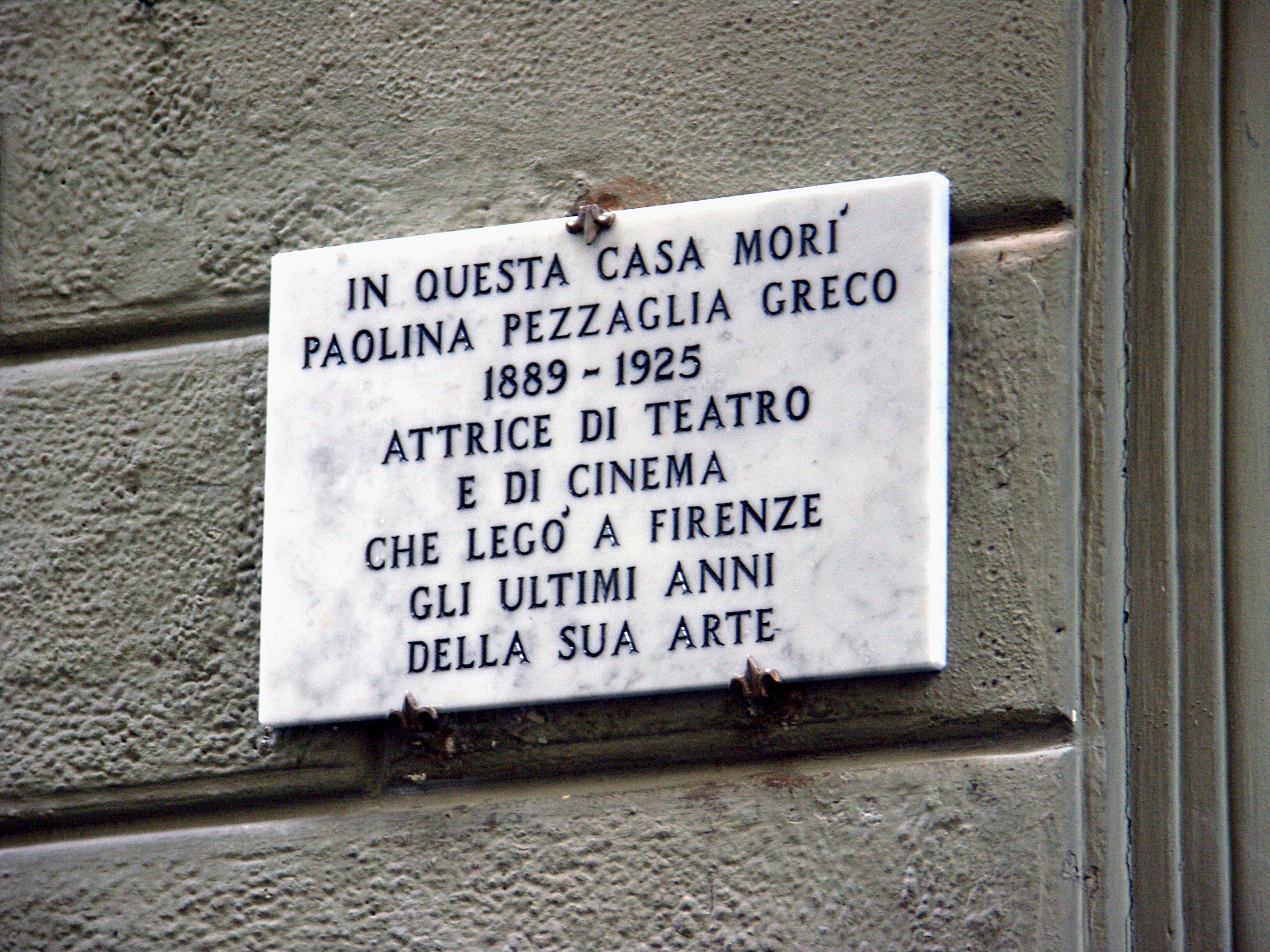 lapide commemorativa di Paola Pezzaglia sulla casa dove morì, in Via Faenza, 12